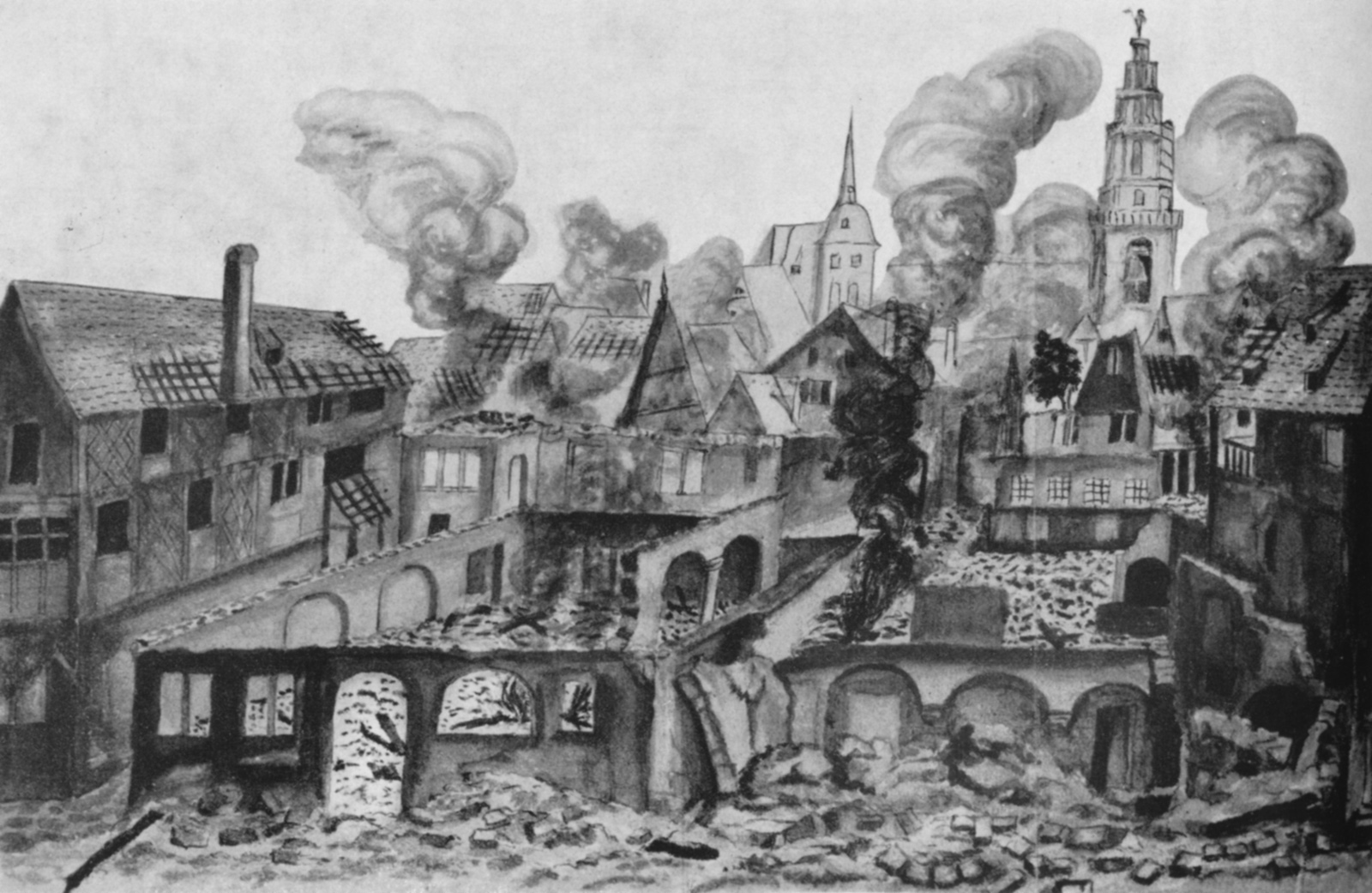 Brand im Kais(ers)heimer Hof in Heilbronn 1688 (Originaltitel: Brand in Kaisersh. Hoff). Bleistiftzeichnung, 19,2×29,5 cm.